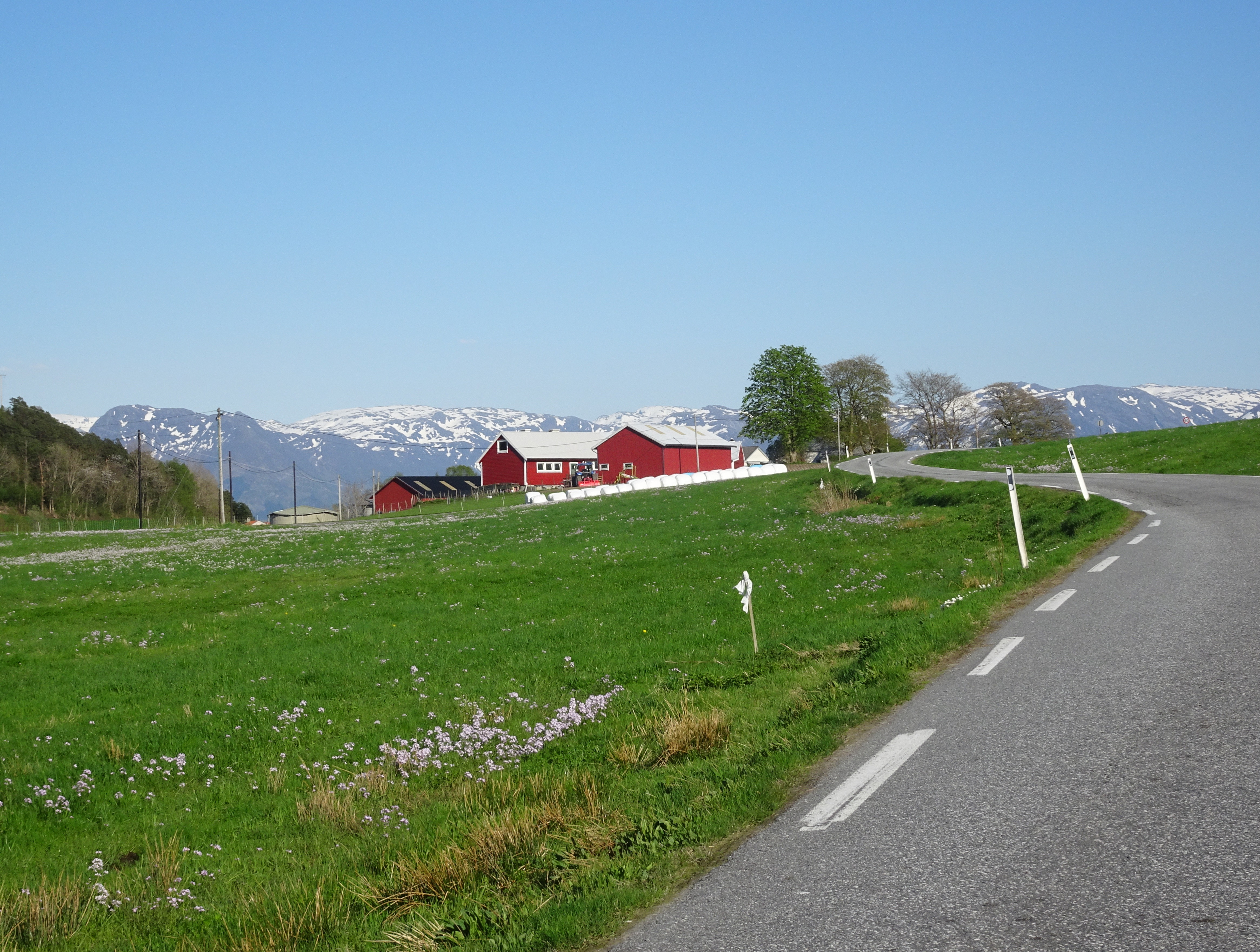 Ølvesvegen (primær fylkesvei 49) sør for Ølve kirke